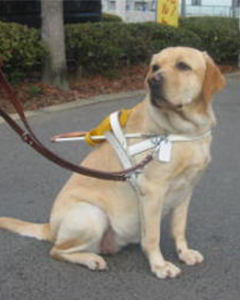 盲導犬のアロマ